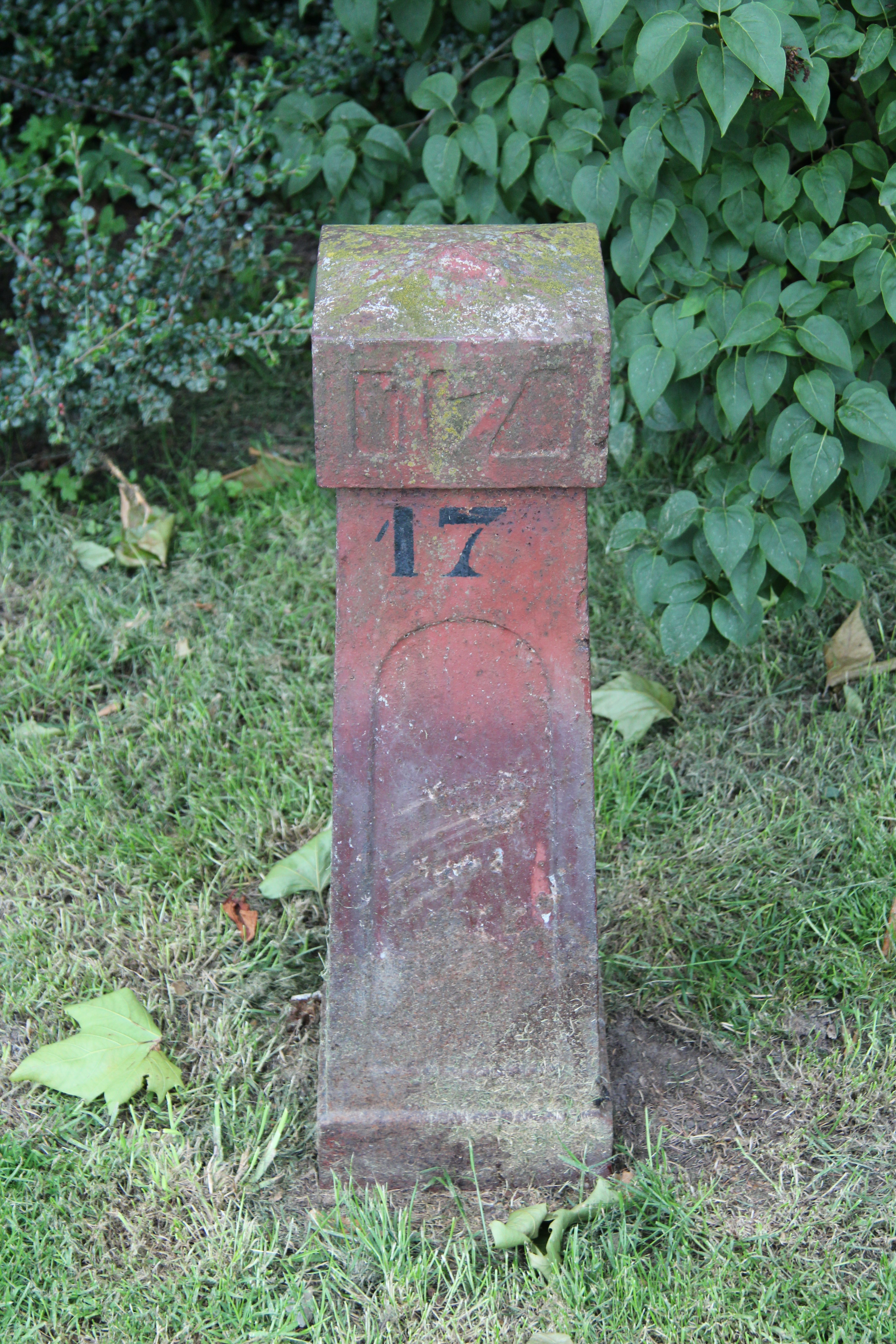 Paaltje langs de Vliet